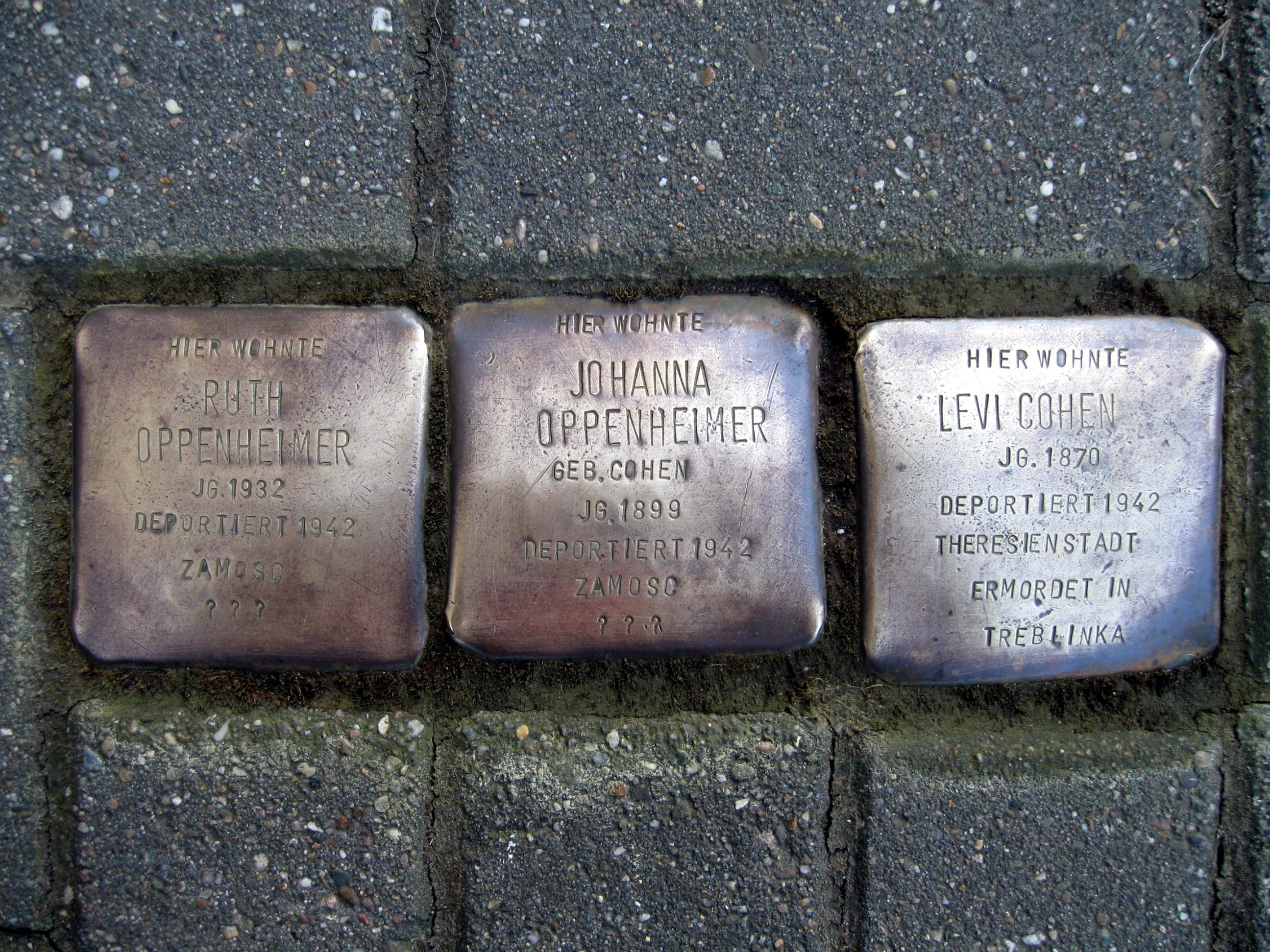 Stolpersteine in Dortmund, Wickeder Hellweg 91